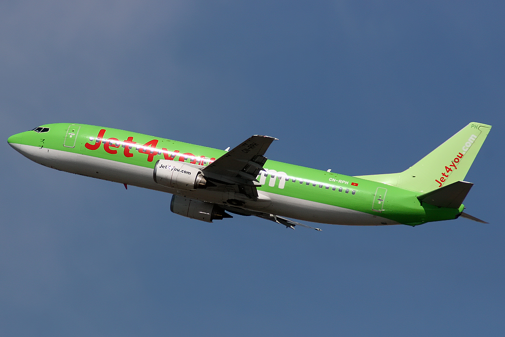 Boeing 737-800 Jet4you